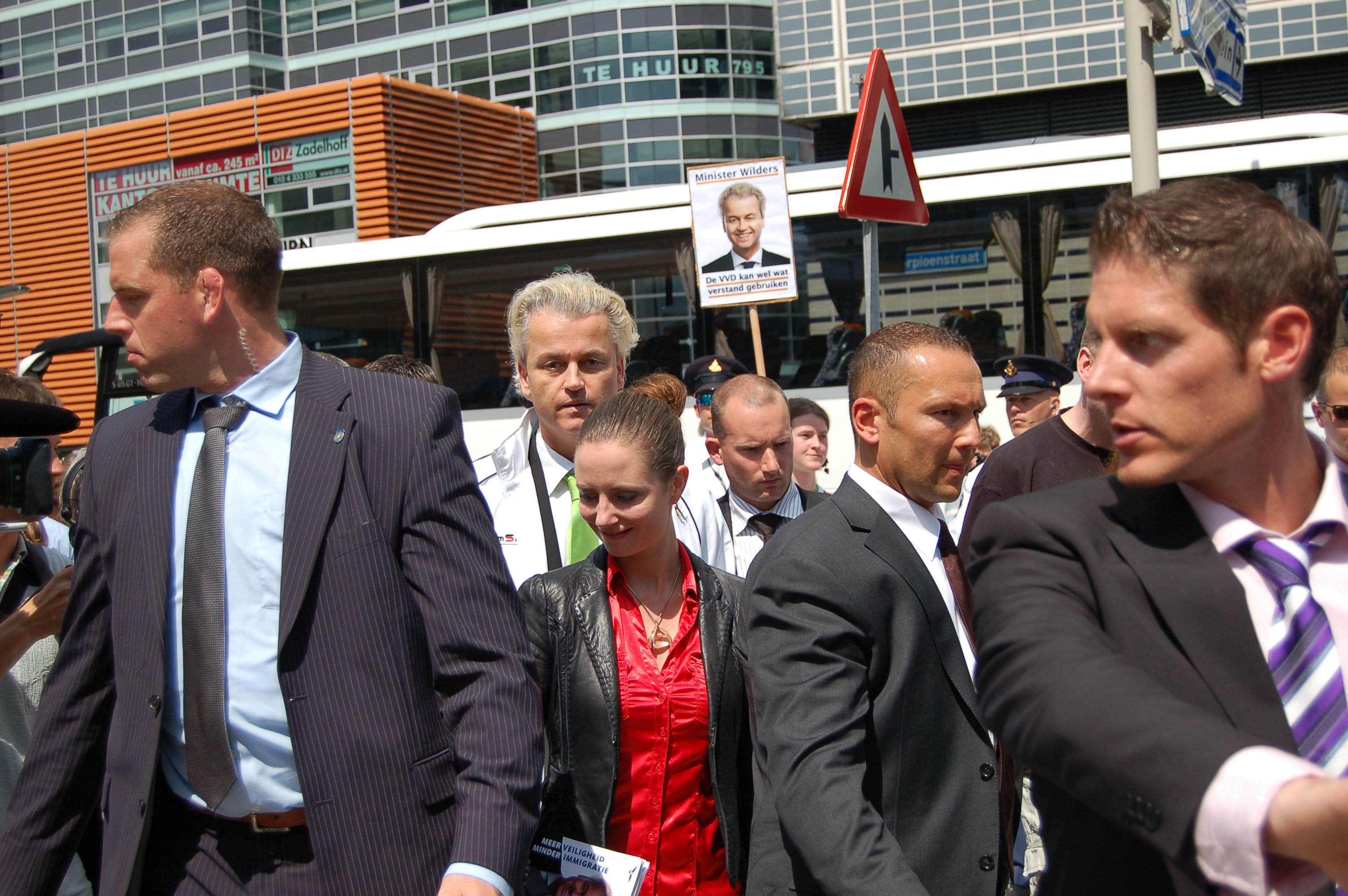 Geert Wilders en Fleur Agema bezoeken Rotterdam.